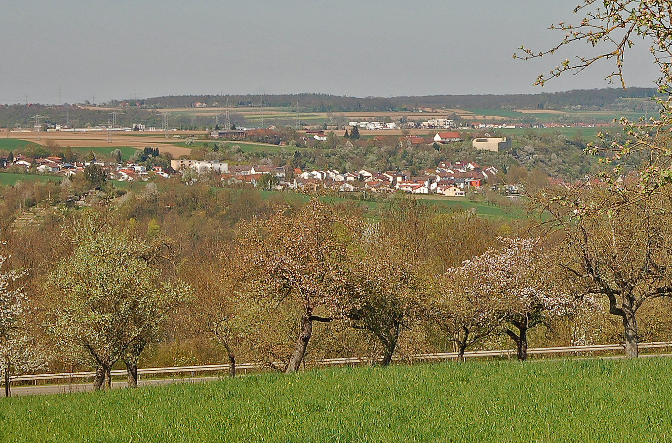 Untermberger Krautgartensiedlung, Egartenhof und Altsachsenheim vom Hohberg (südostl. v. Unterriexingen)